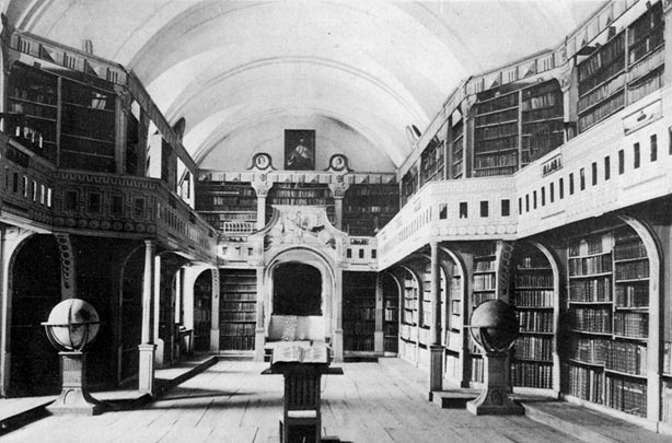 Biblioteca Batthyaneum, Alba Iulia